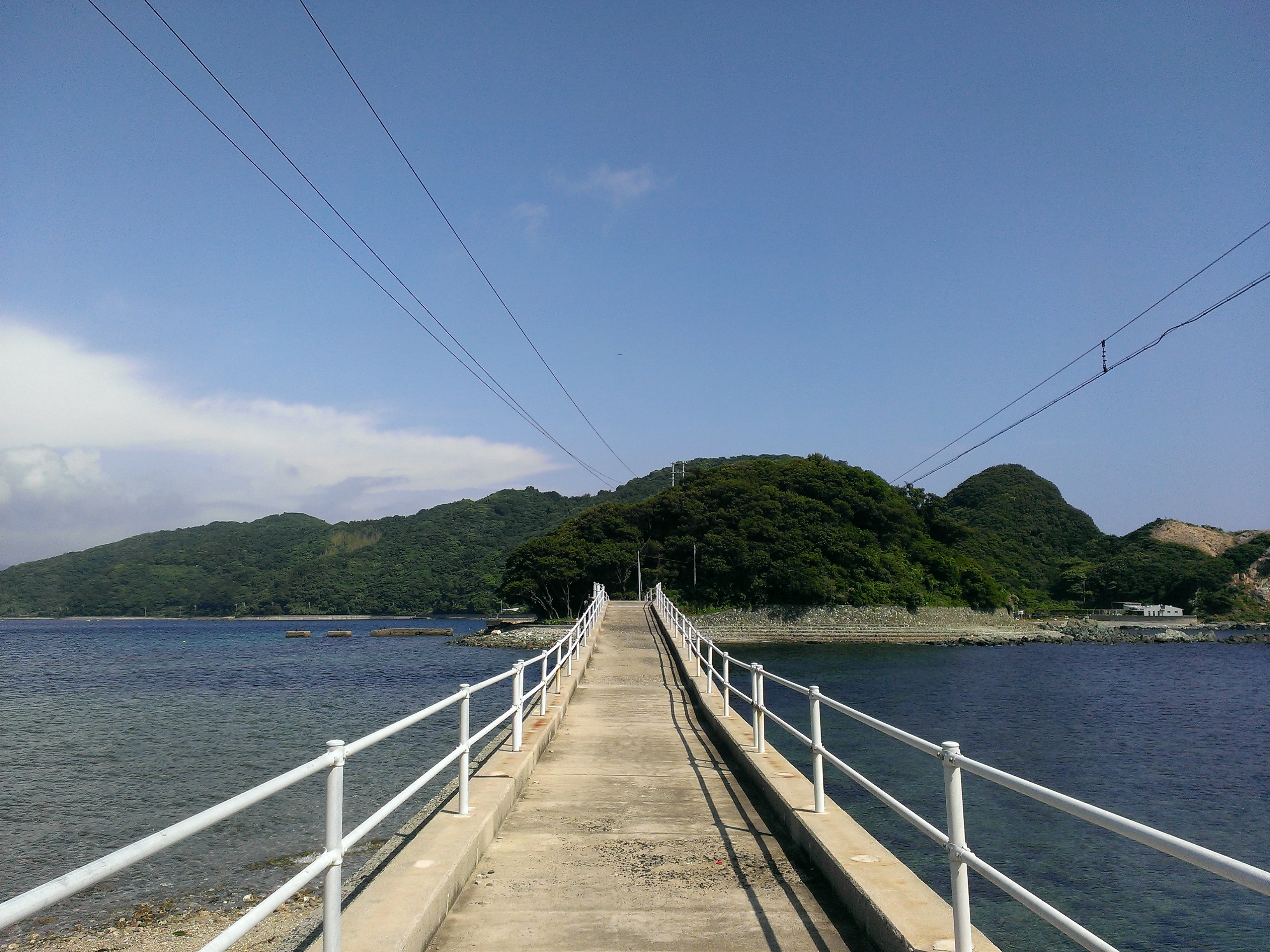 大島と三王島を結ぶ橋